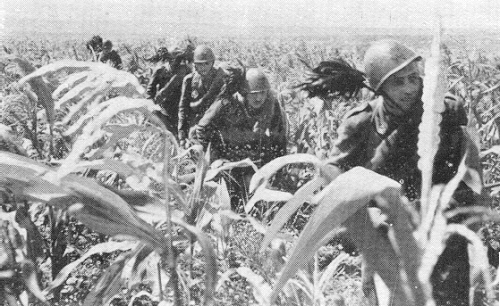 Pattuglia di Bersaglieri avanzano in un campo di grano dell'Ucraina